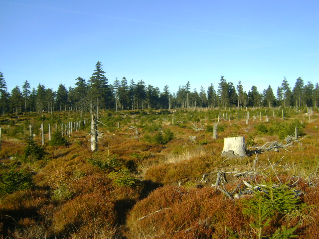 szczyt w Sudetach Wschodnich w Górach Bialskich. Widok od strony południowo-zachodniej z granicy.